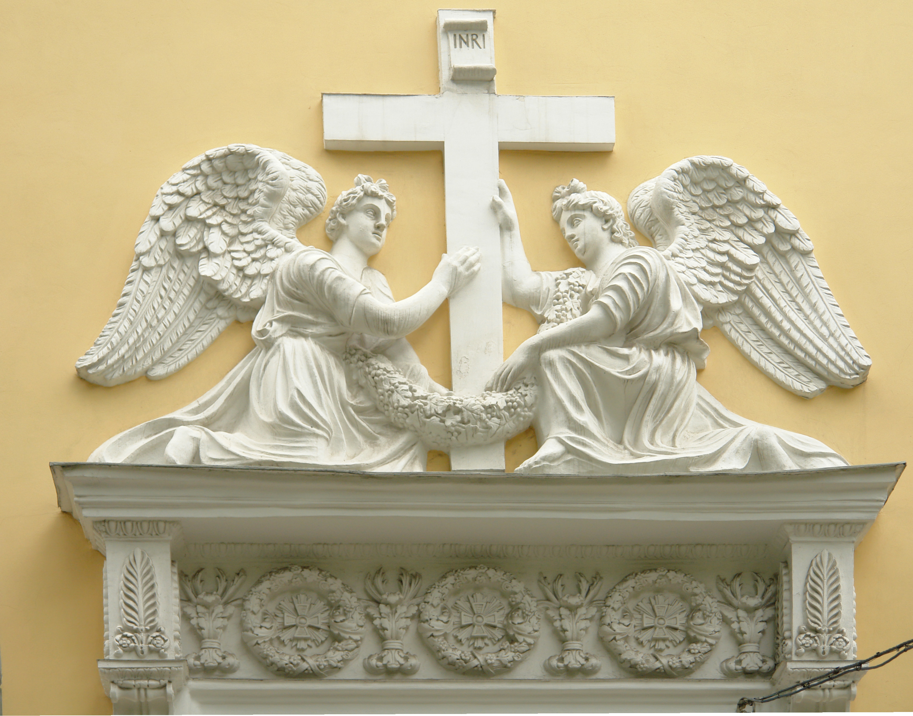 Ангелы над дверью Спасо-Преображенского собора